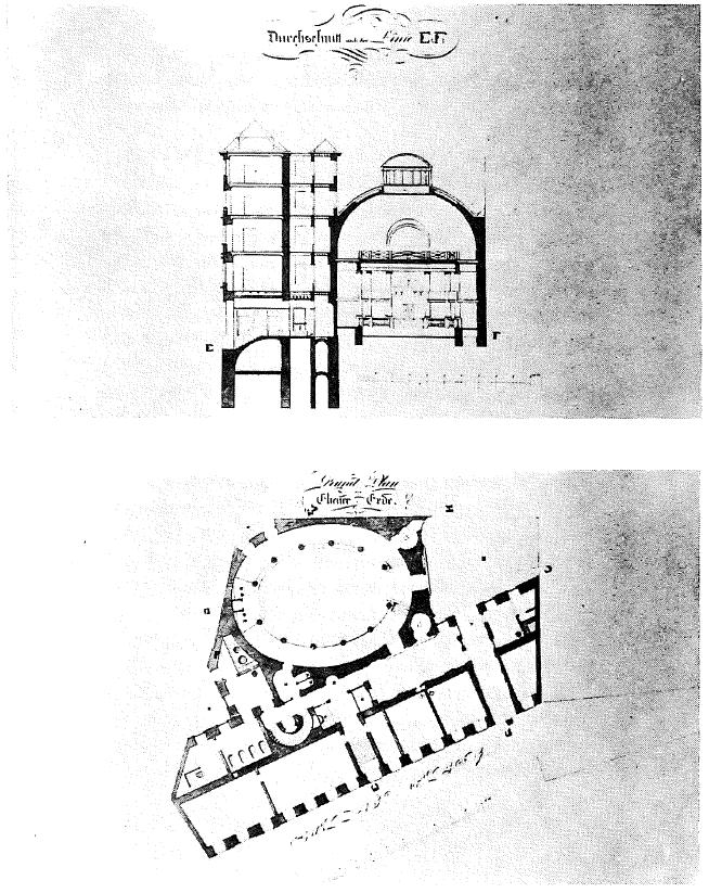 Tempel in der Seitenstettengasse, Bauplan von Josef Kornhäusel.